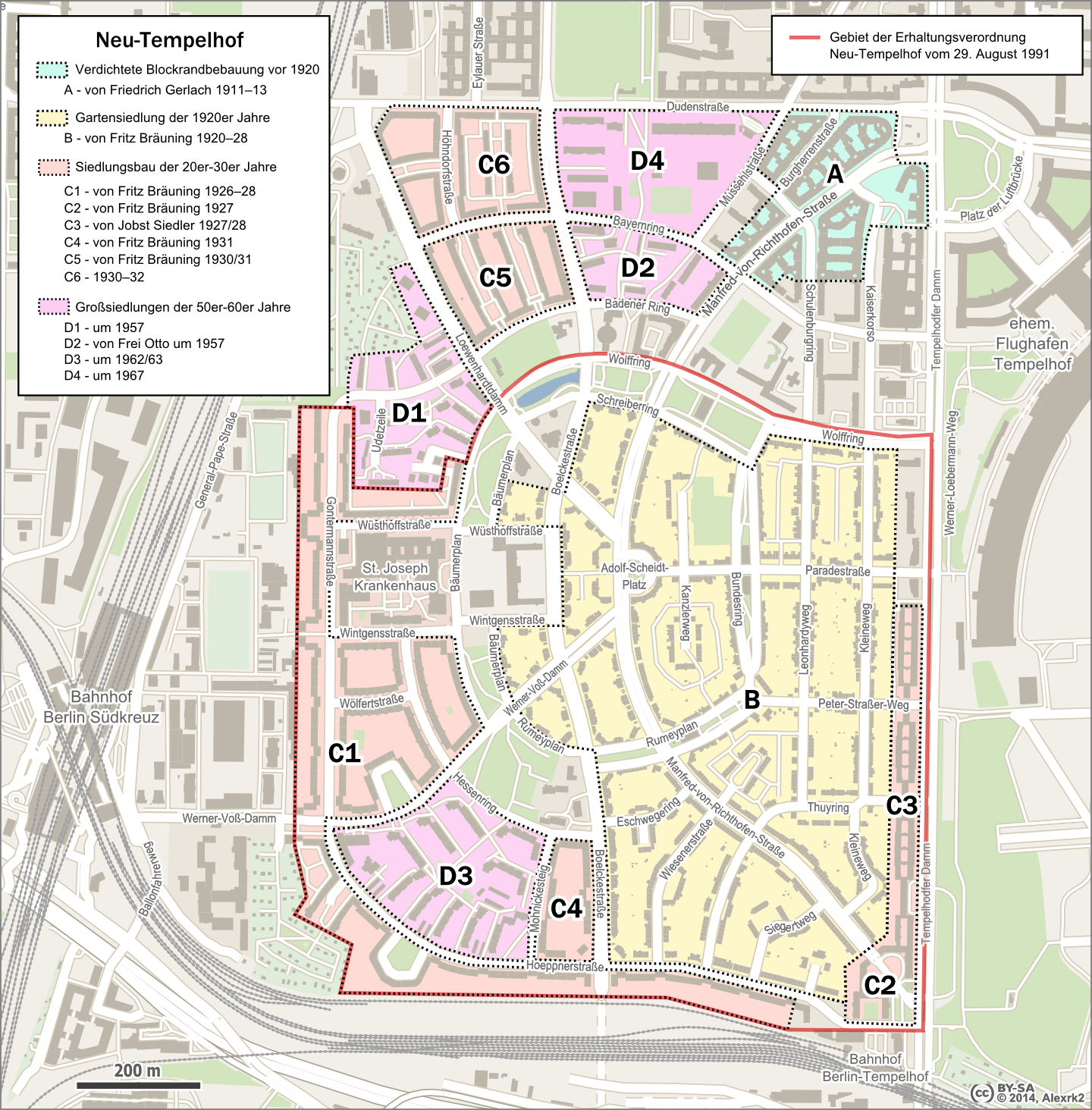 Karte von Neu-Tempelhof mit dem Gebiet der Erhaltungsverordnung und den verschiedenen Bauabschnitten